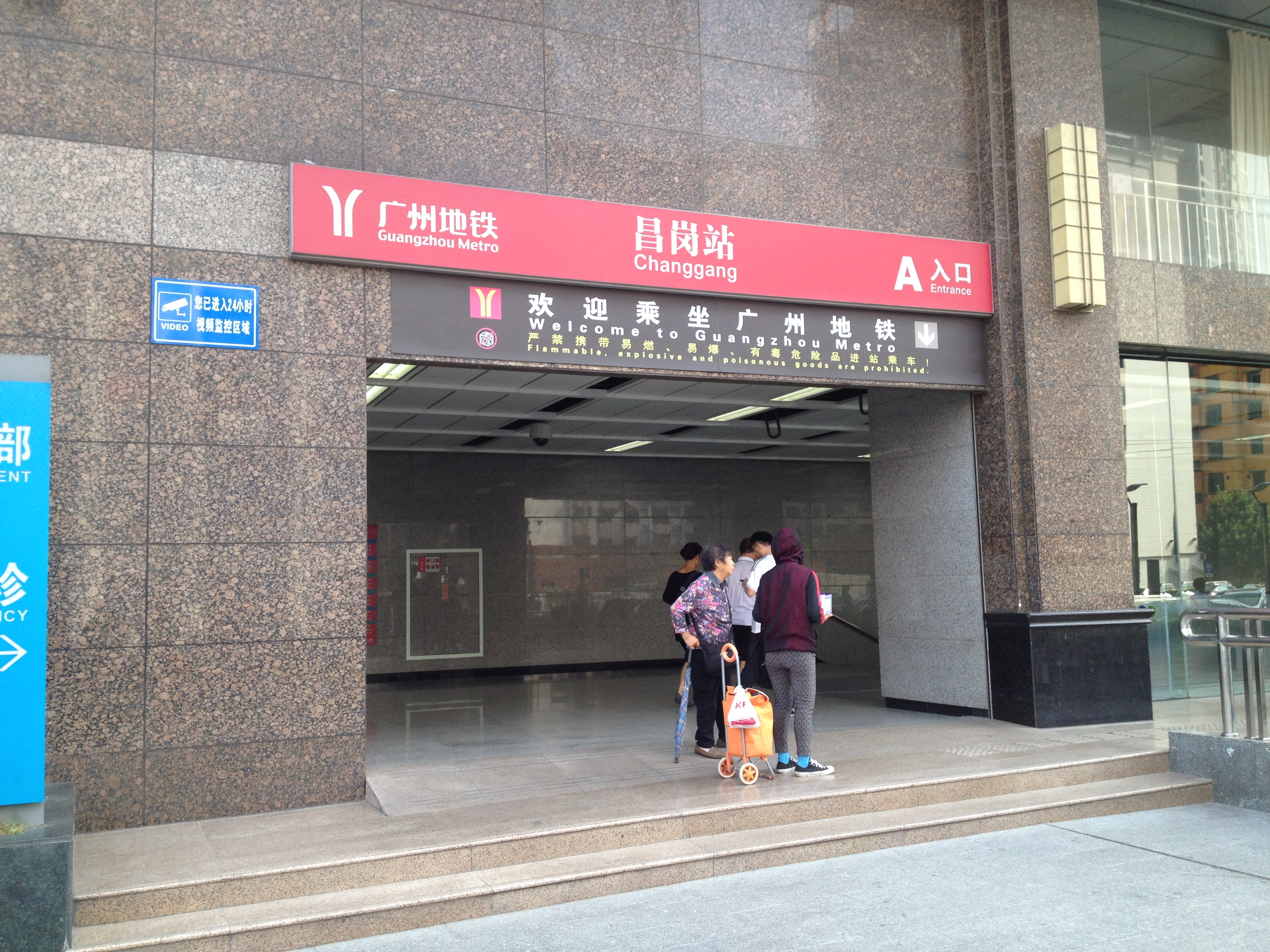 广州地铁昌岗站A出入口